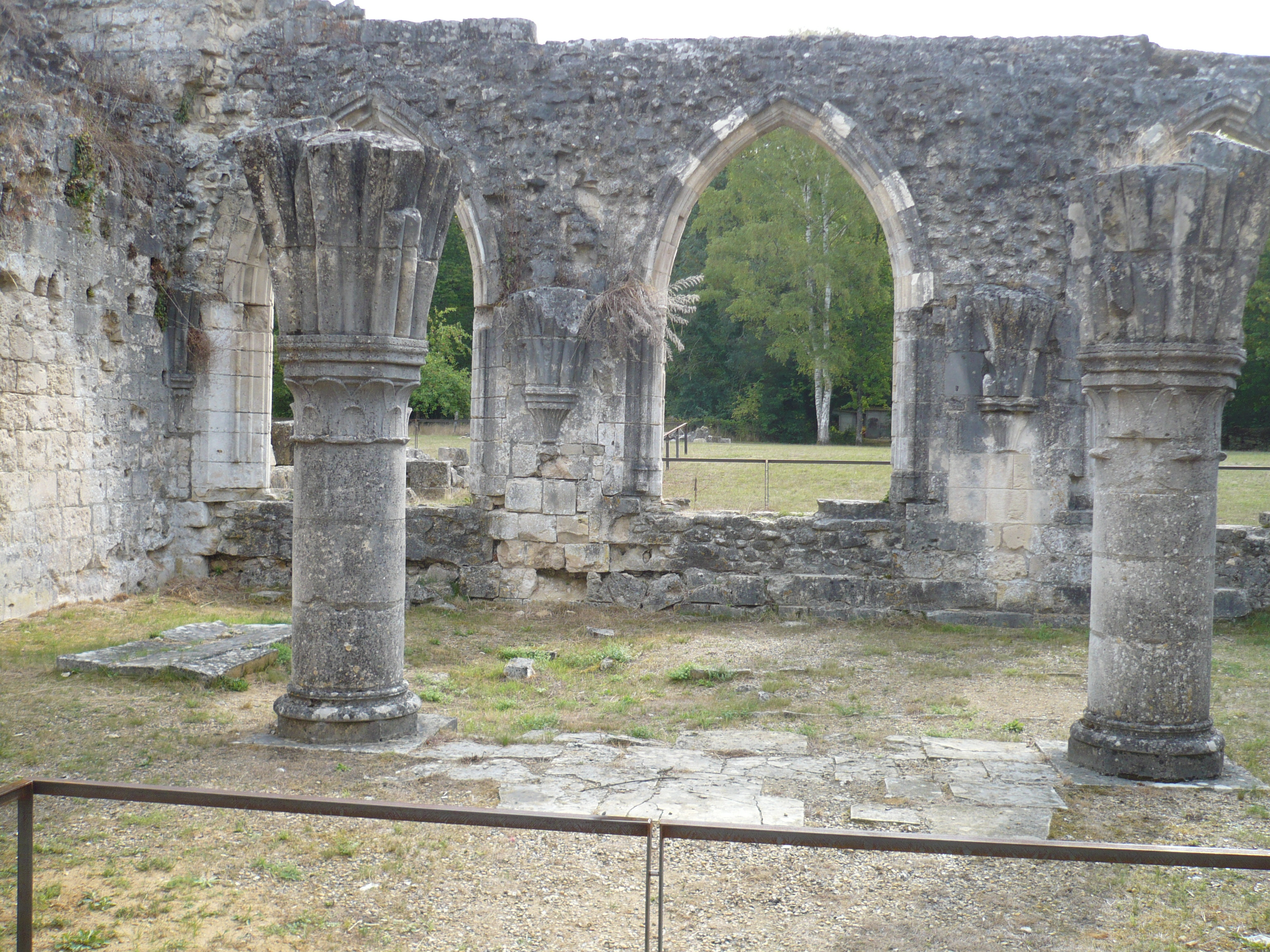 Klosterruine Vaiclair, Kaputelsaal